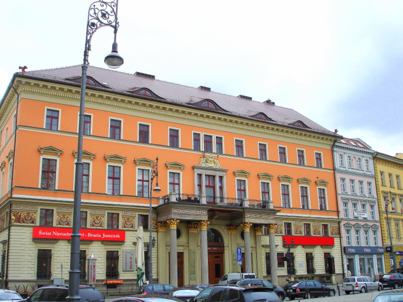 Wrocław Stare Miasto - pl. Solny 16 - Stara Giełda, obecnie budynek biurowy, 1822-1824